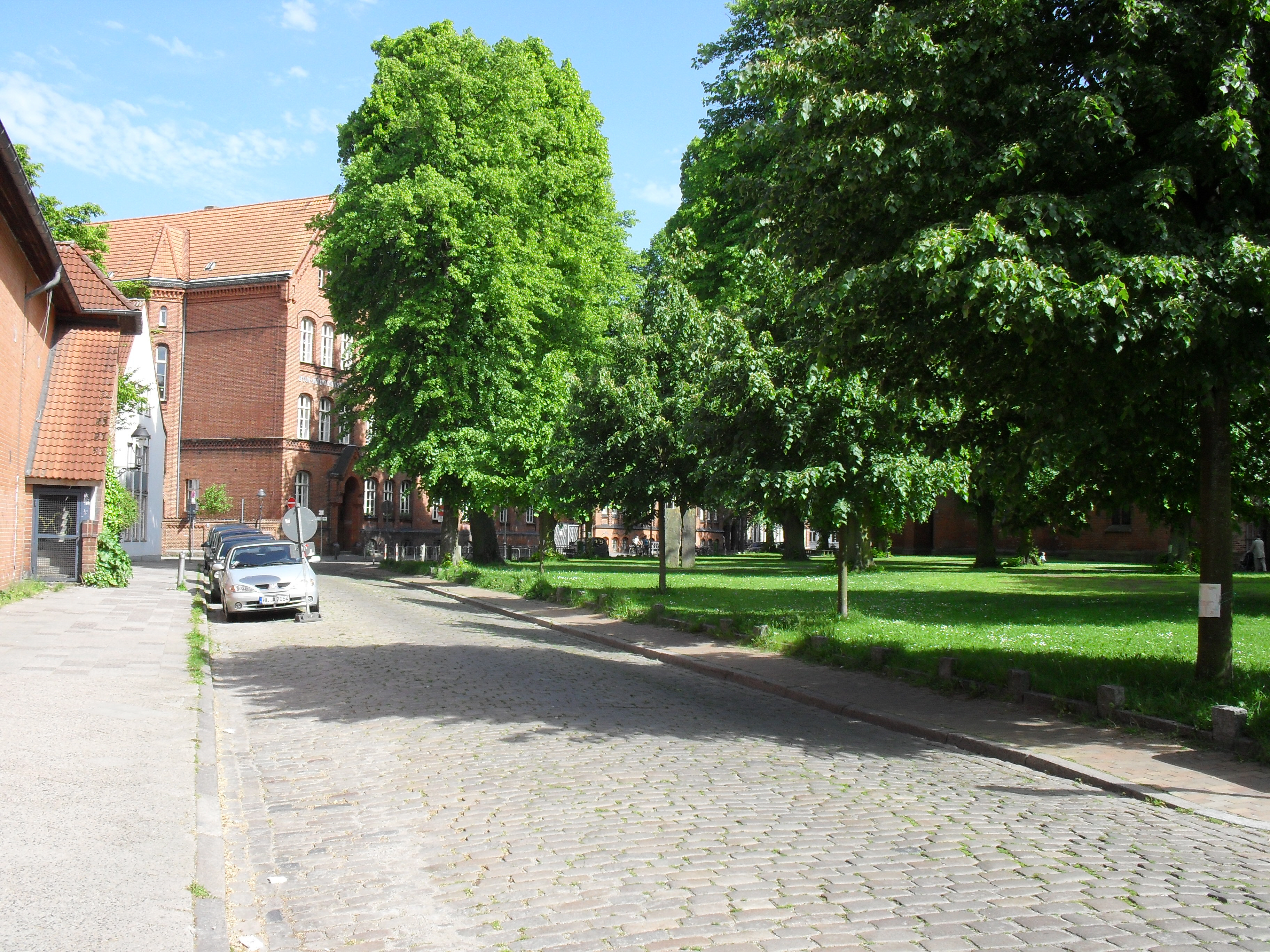 Der Domkirchhof in Lübeck